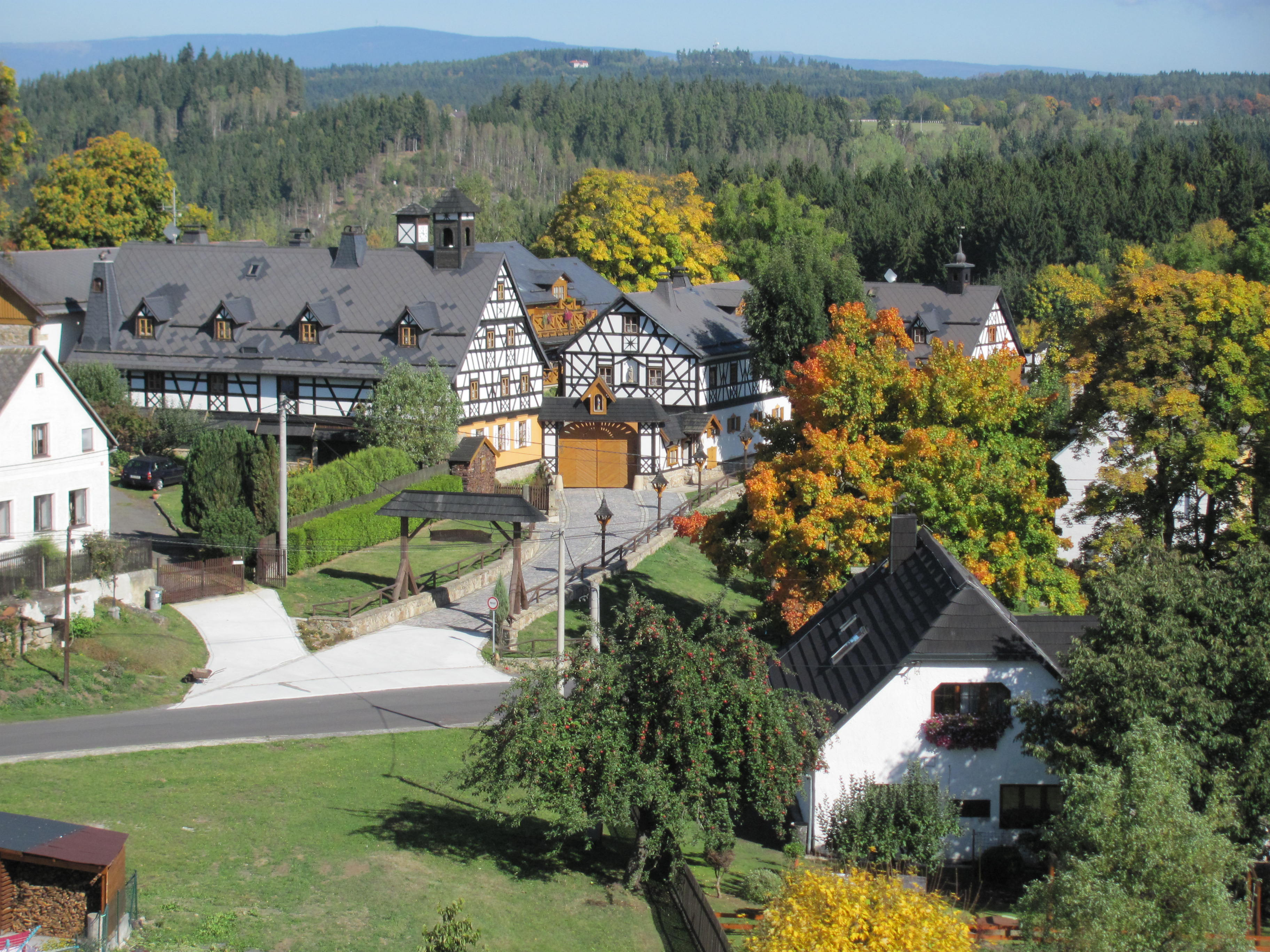 Selský statek Stanovice, v pozadí Krušné Hory (Klínovec)